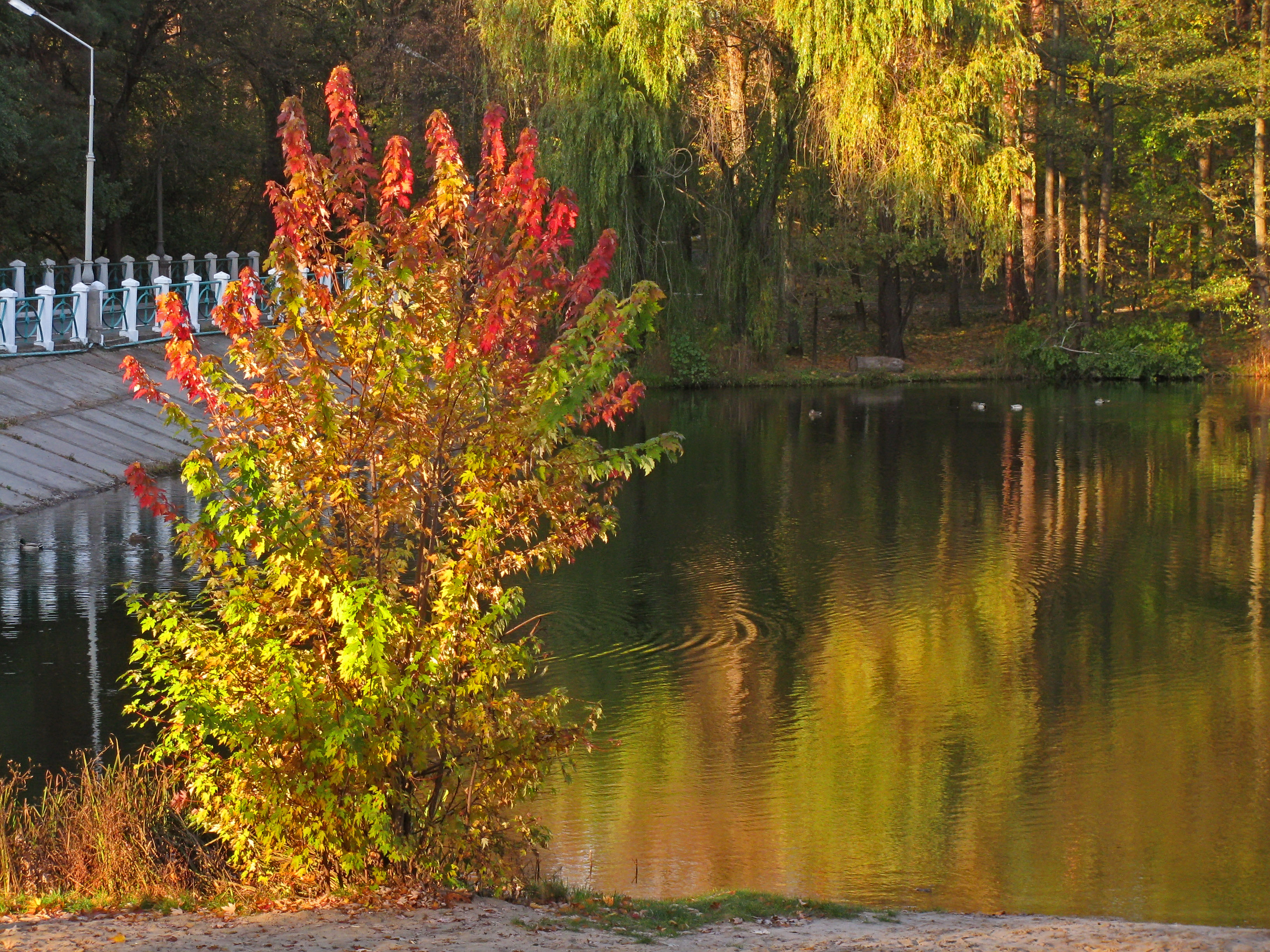 Пуща-Водицький лісопарк, Оболонський район